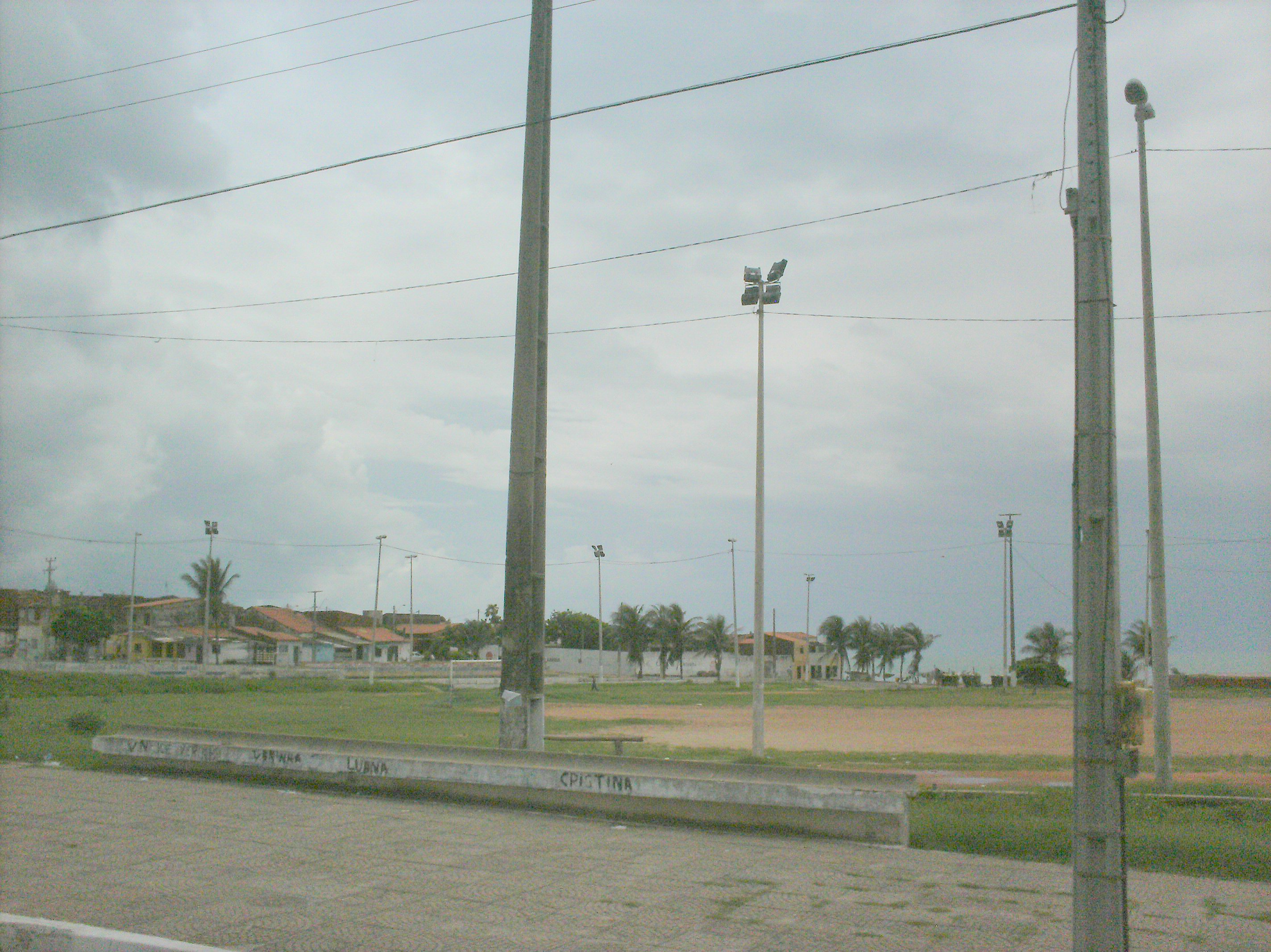 Vista do Cartodromo do Pirambu, Fortaleza.